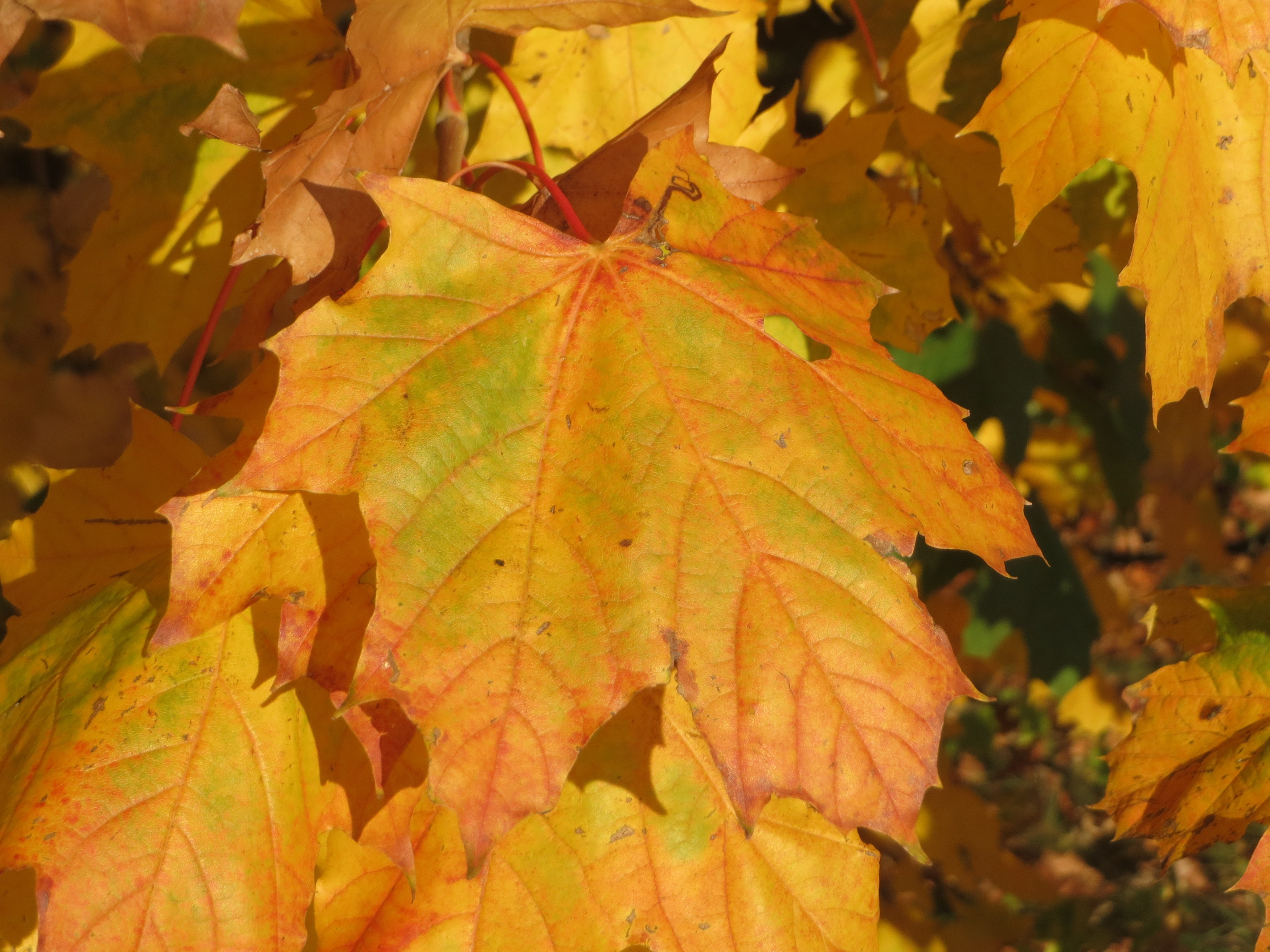 Spitzahorn (Acer platanoides) bei Reilingen